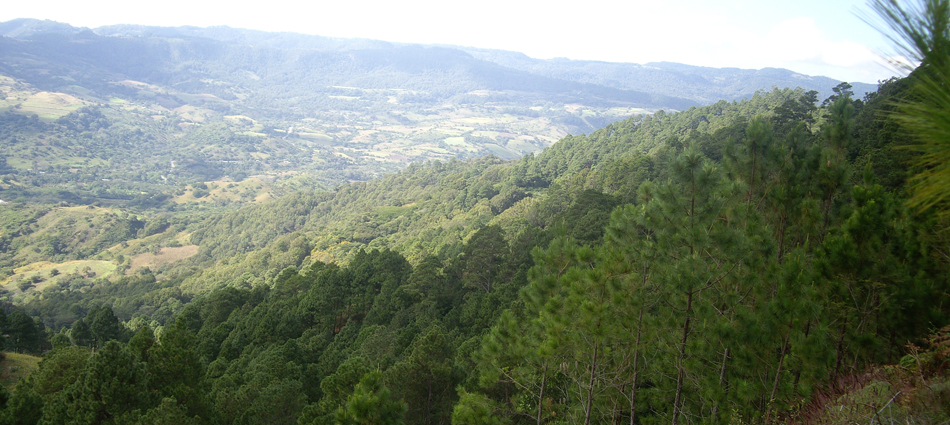 Cerro Tomabú de 1445 metros sobre el nivel del mar, cubierto de bosques de pino.